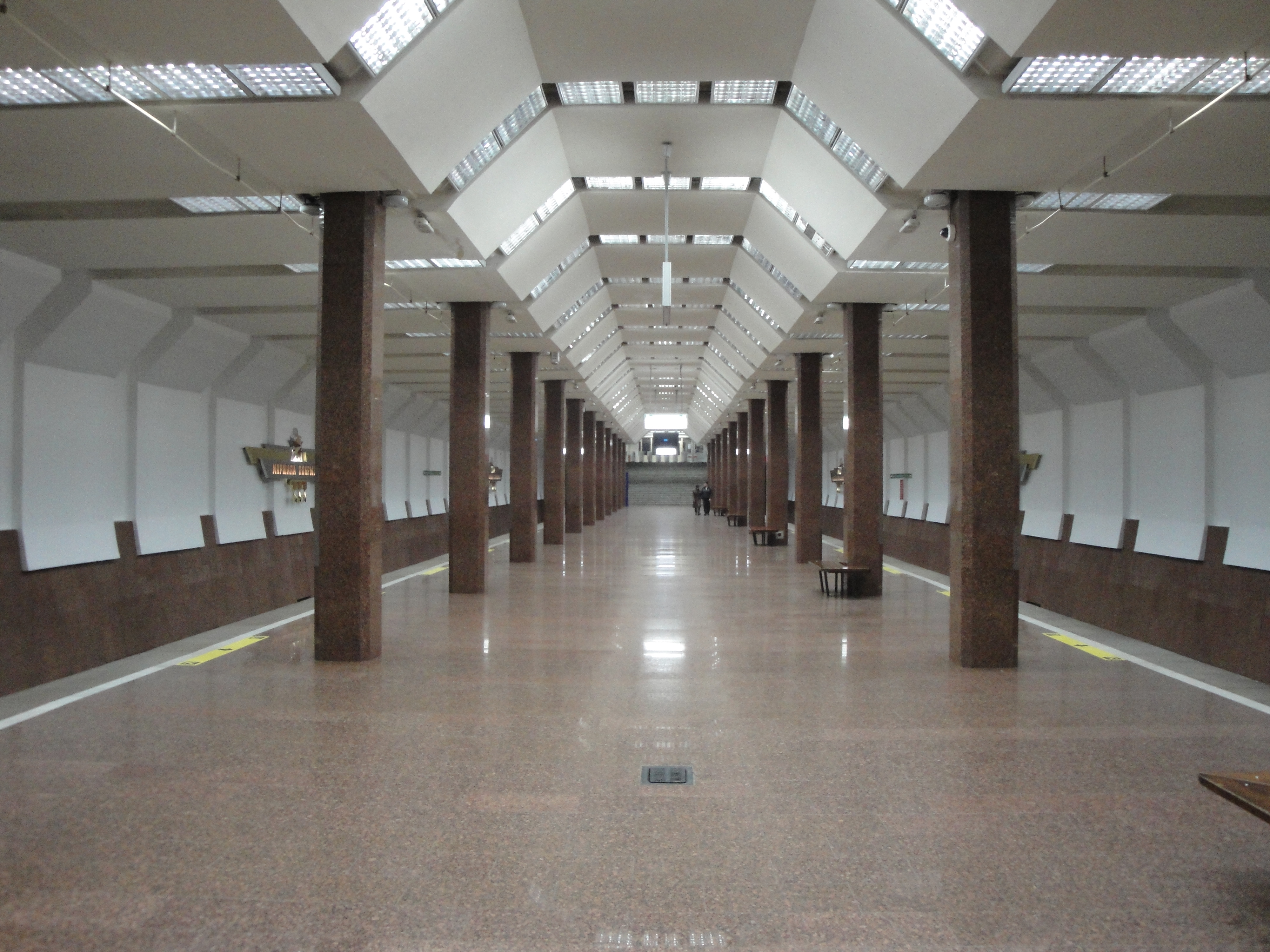 Станция метро «Маршала Покрышкина». Общий вид в новом оформлении